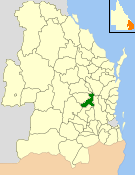 Comté de Nanango